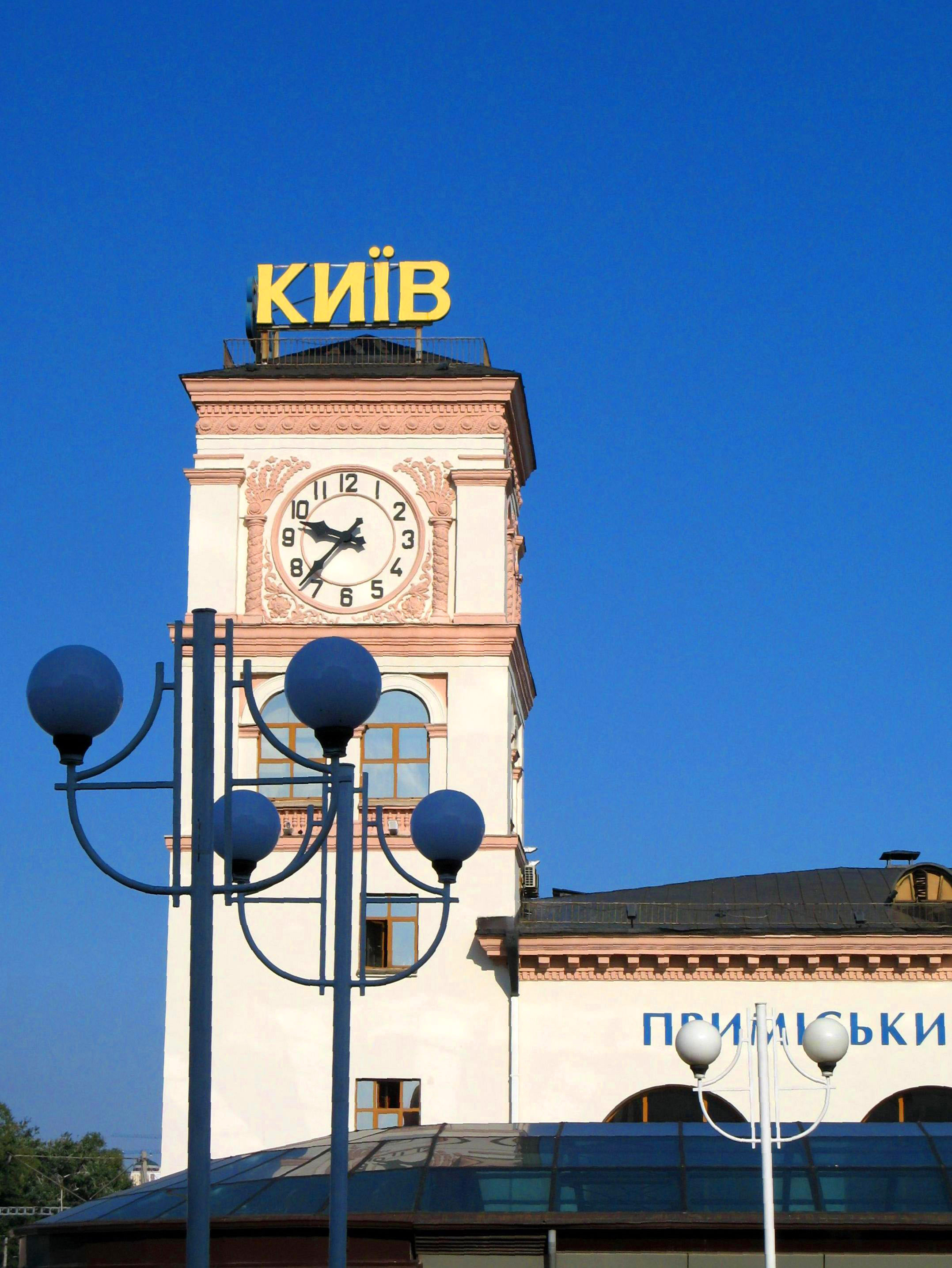 Вокзал залізничний, Київ, Вокзальна пл.. Будівля Приміського вокзалу